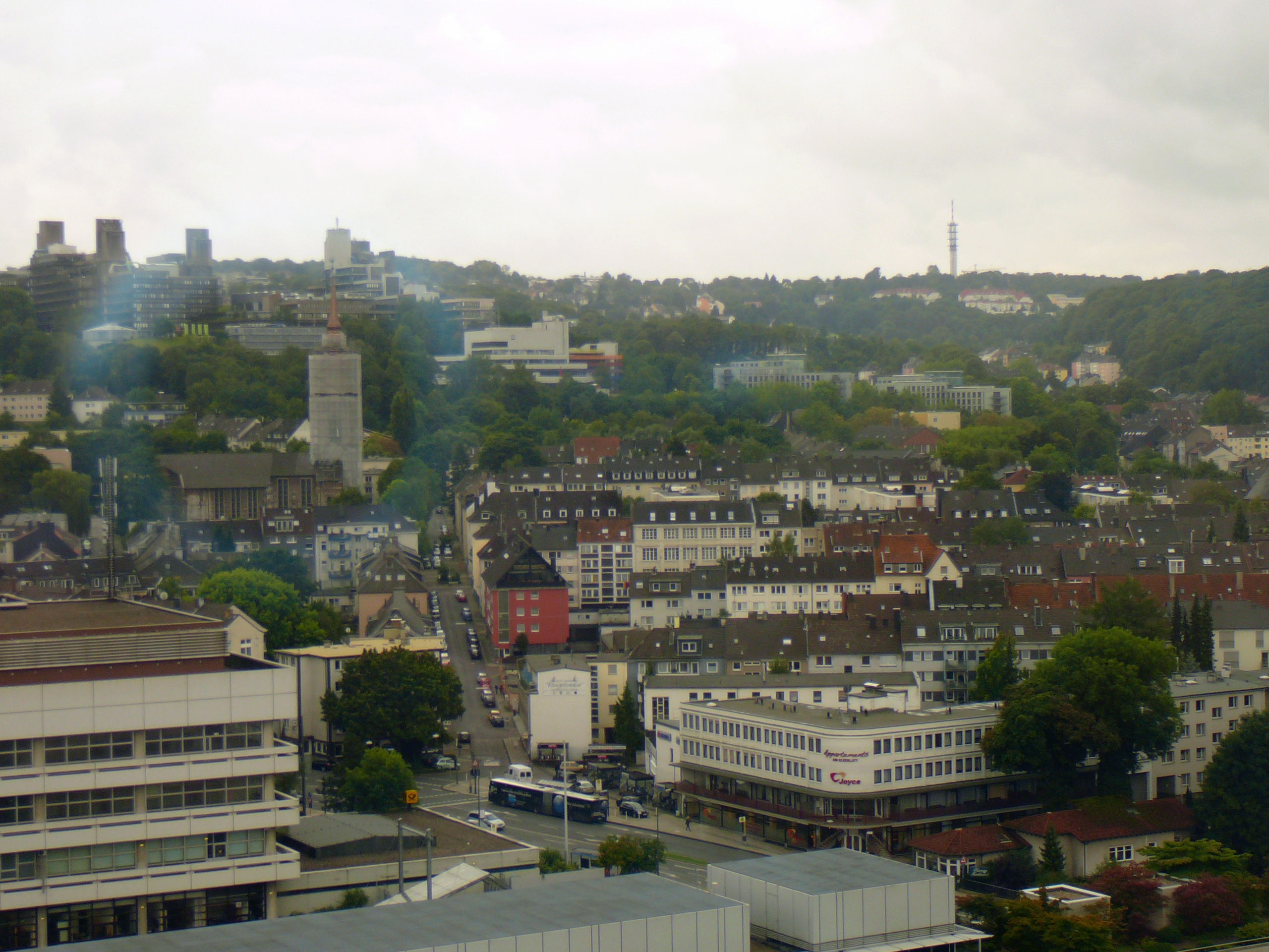 Wuppertal, Islandufer, Blick vom SparkassenturmThis is a photograph of an architectural monument. 3230